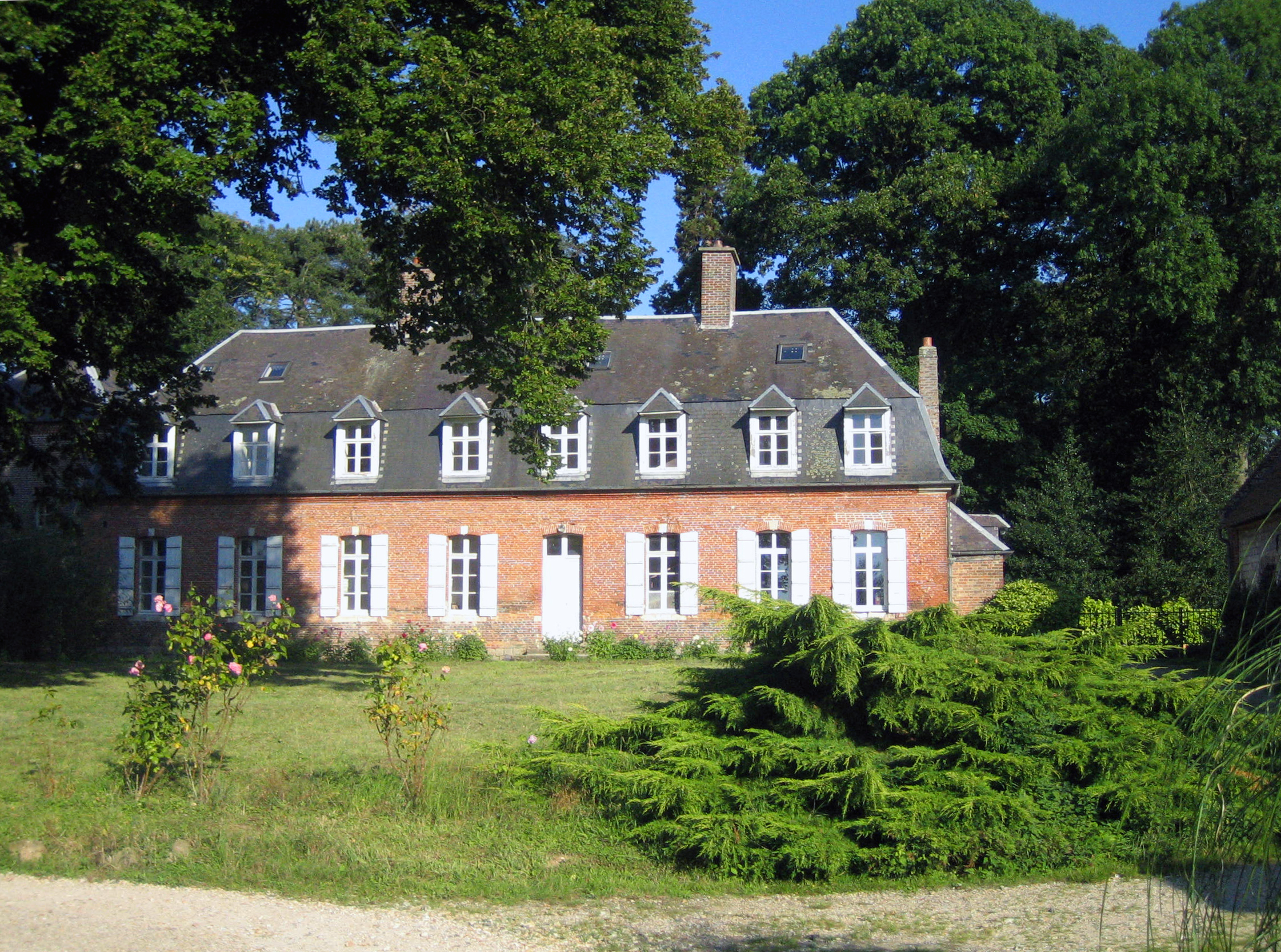 Bovelles (Somme, France) - Façade Ouest de l'ancien manoir seigneurial. . .